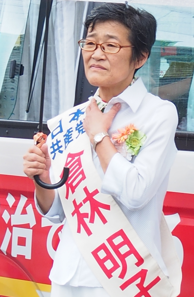 2019年7月14日に京都市内で演説を行う倉林明子